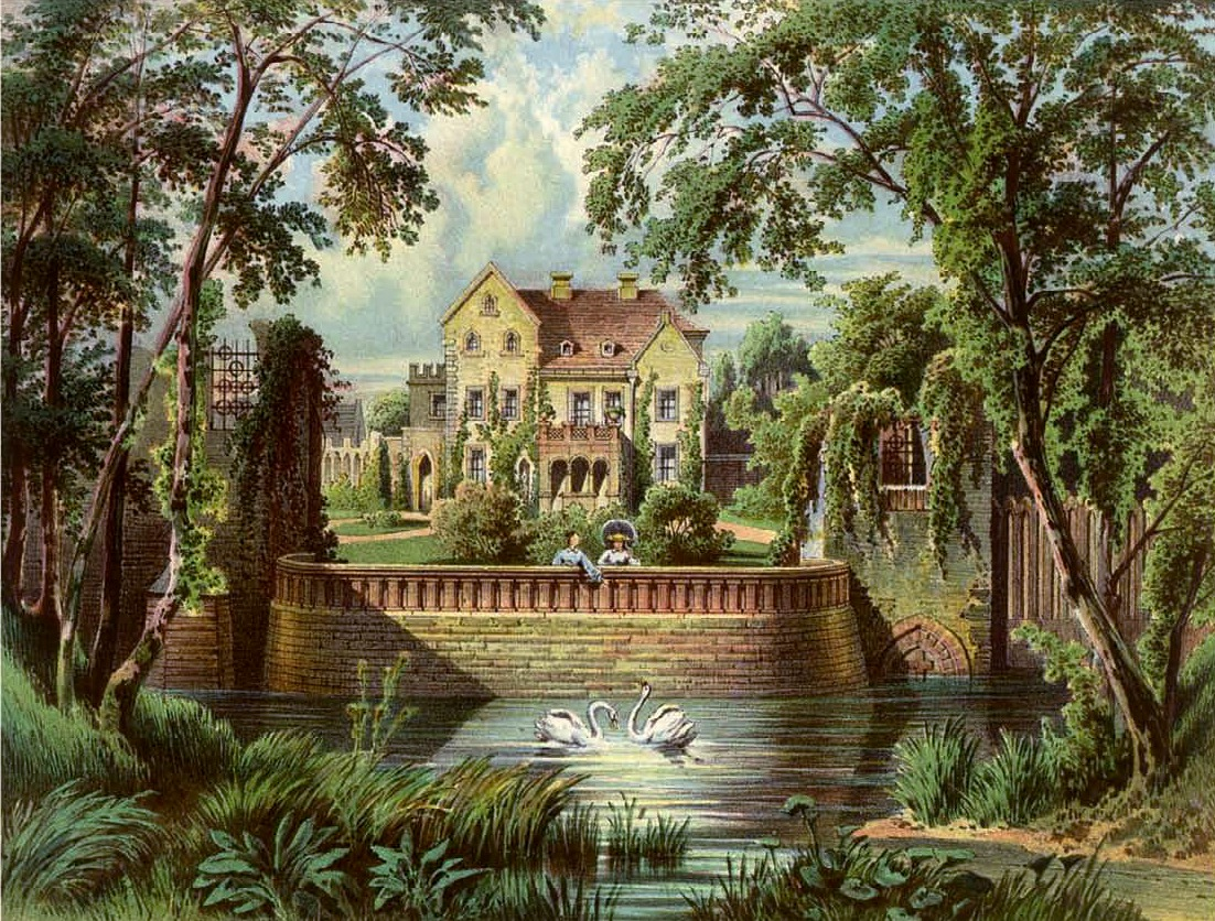 Rittergut Petzkendorf, Kreis Querfurt, Lithographie von Alexander Duncker, 1869